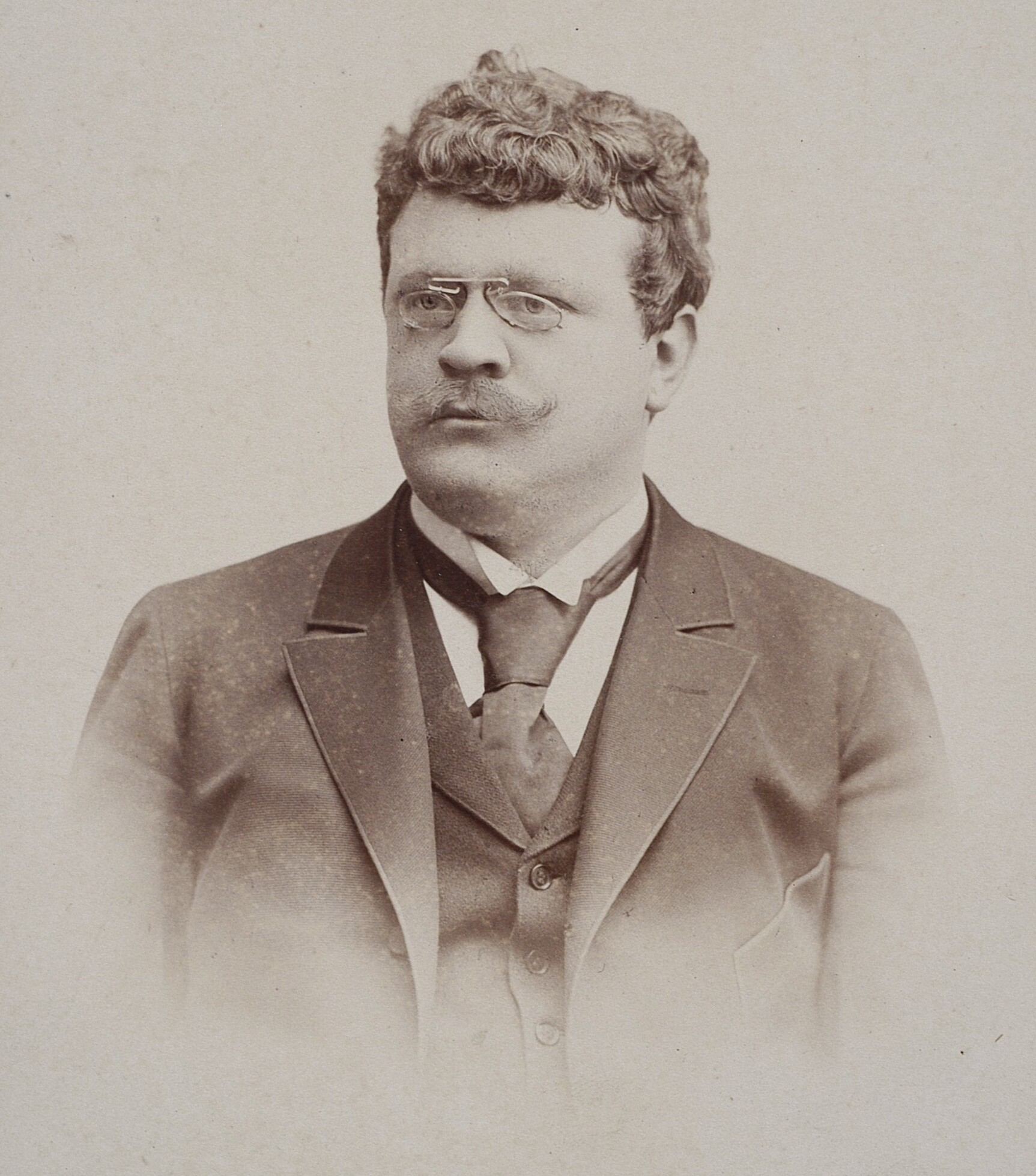 Stanisław Barcewicz, 1891 r.